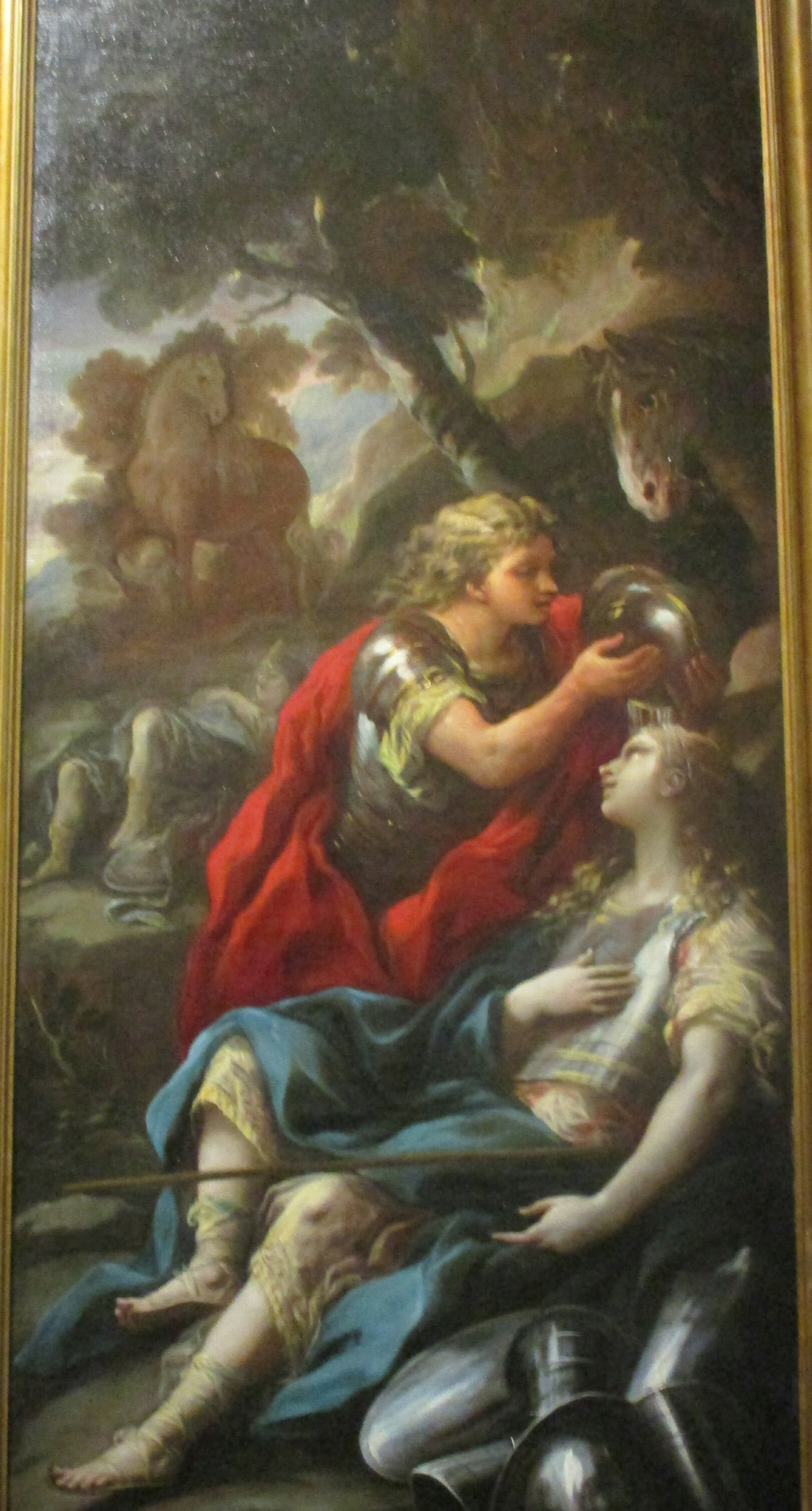 Luca Giordano, Tancrède baptisant Clorinde (1697), collection particulière à Salamanque. Montré à l'exposition Luca Giordano au Petit Palais de Paris (novembre 2019-février 2020).